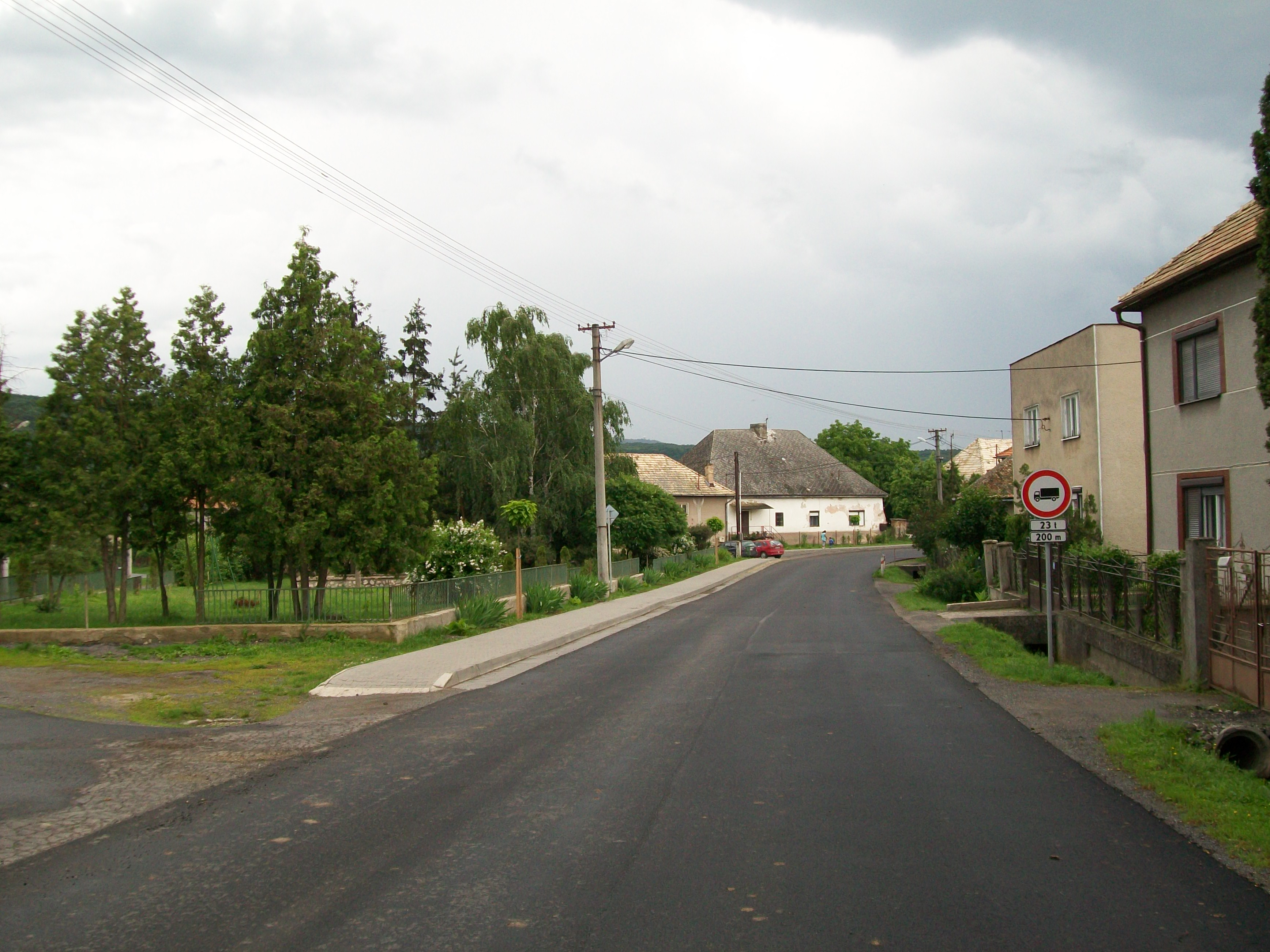 Ulica obce Veľké Dravce